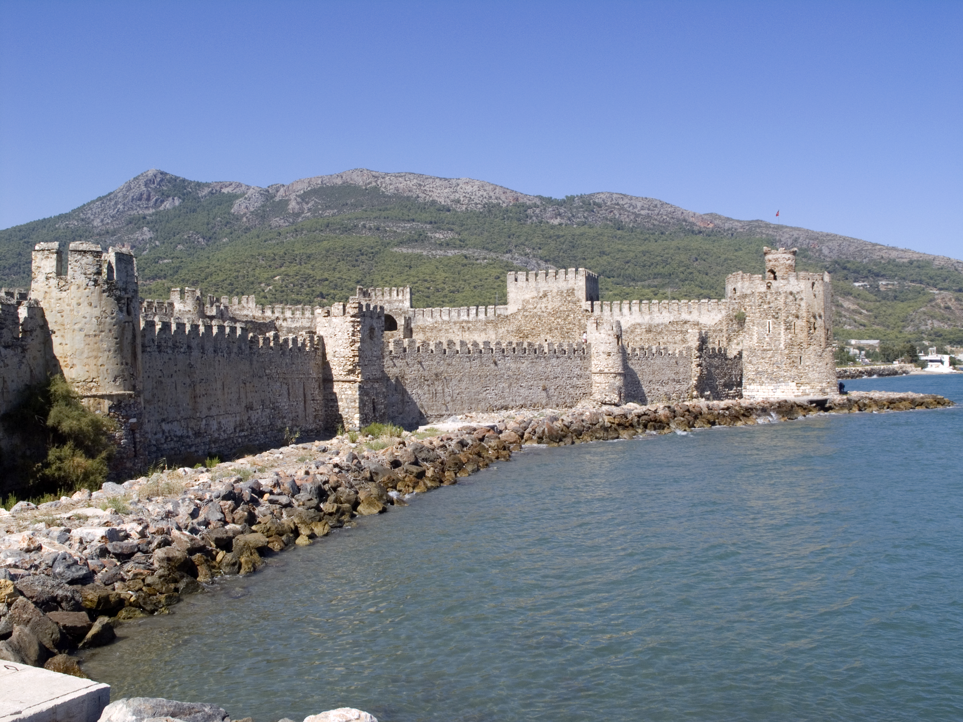 Турция, Анамур – Крепость Мамуре